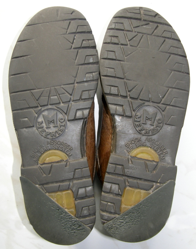 Alte Schuhsohle